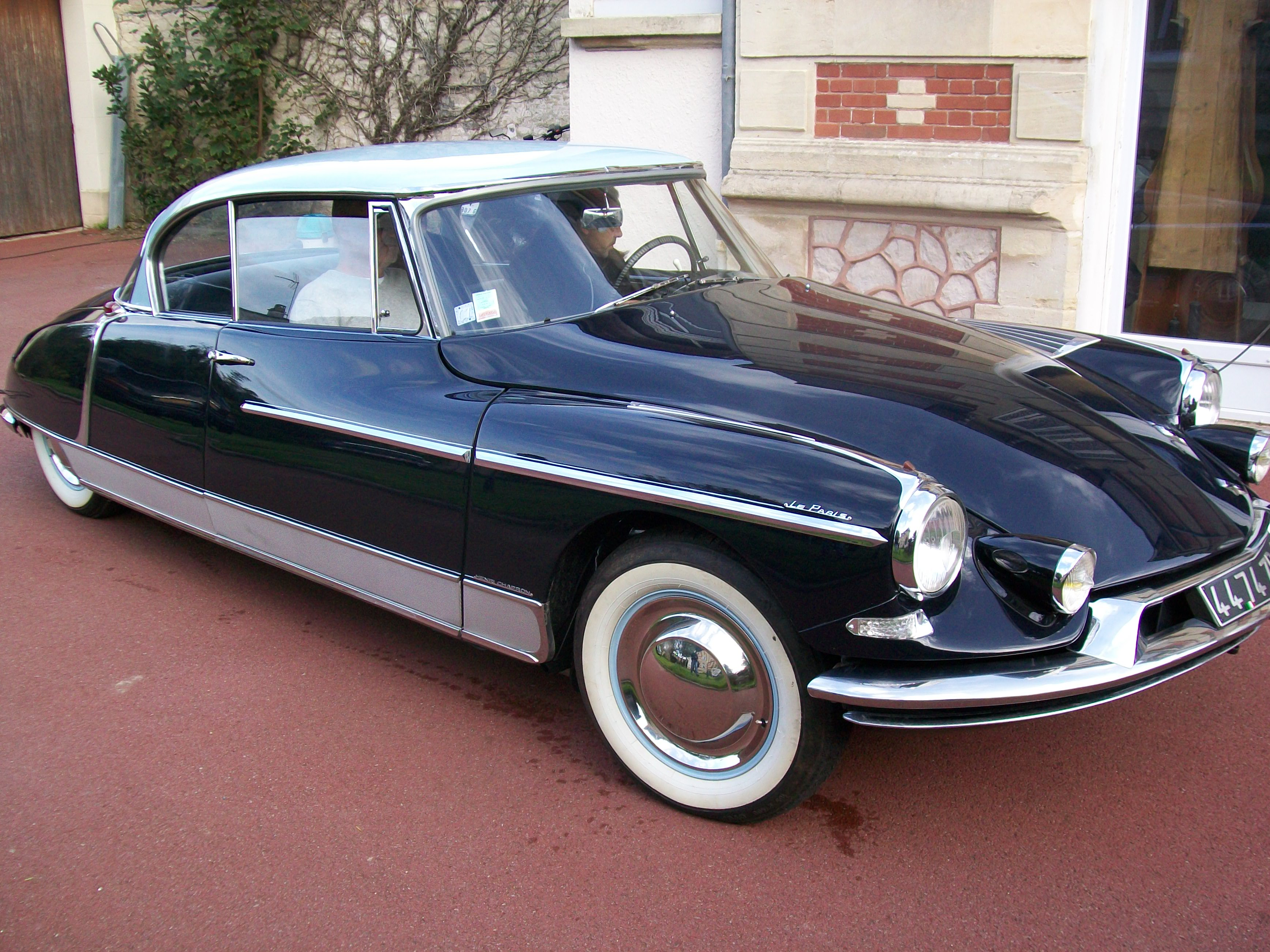 DS 19 Le Paris 002 carrosserie par Henri Chapron restauré par Vincent Crescia